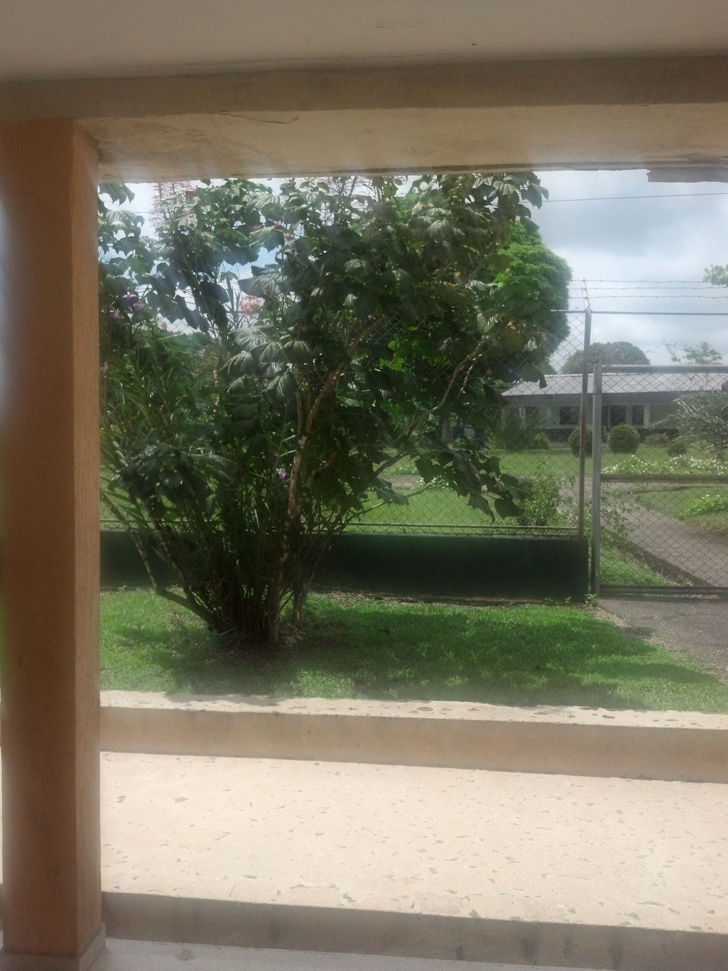 Representación del espacio fisico